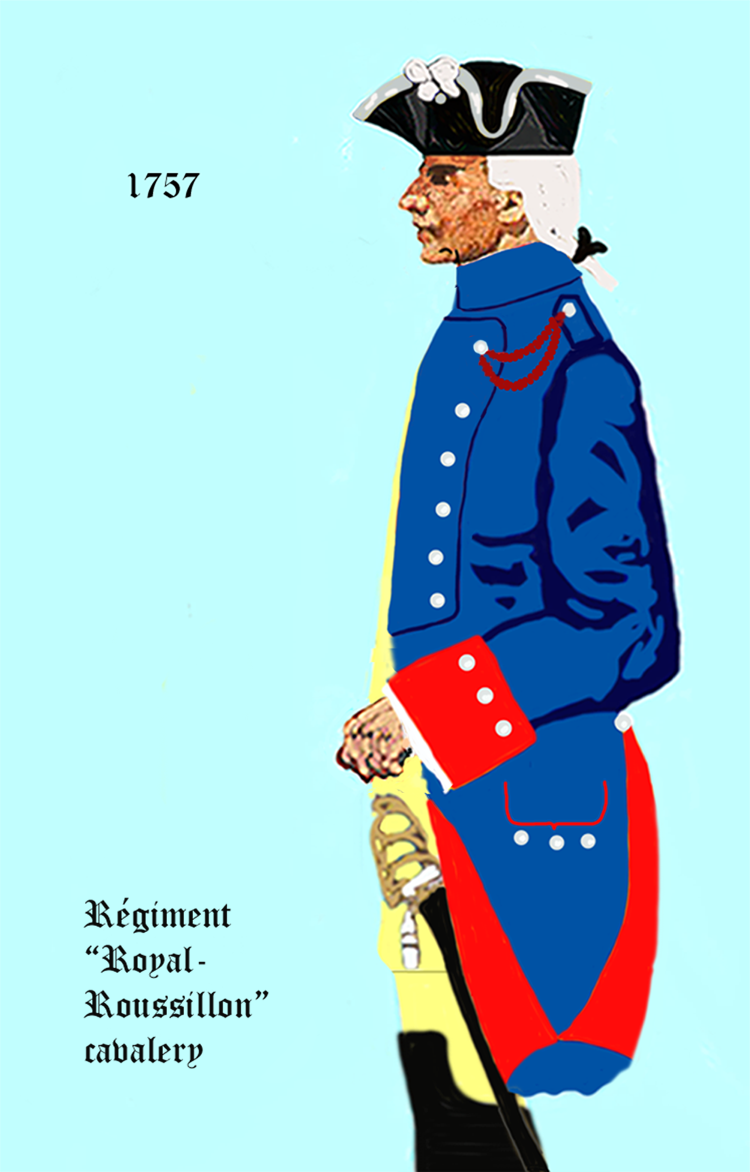 Uniform eines französischen Kavallerie-Regiments gemäß Verordnung von 1757